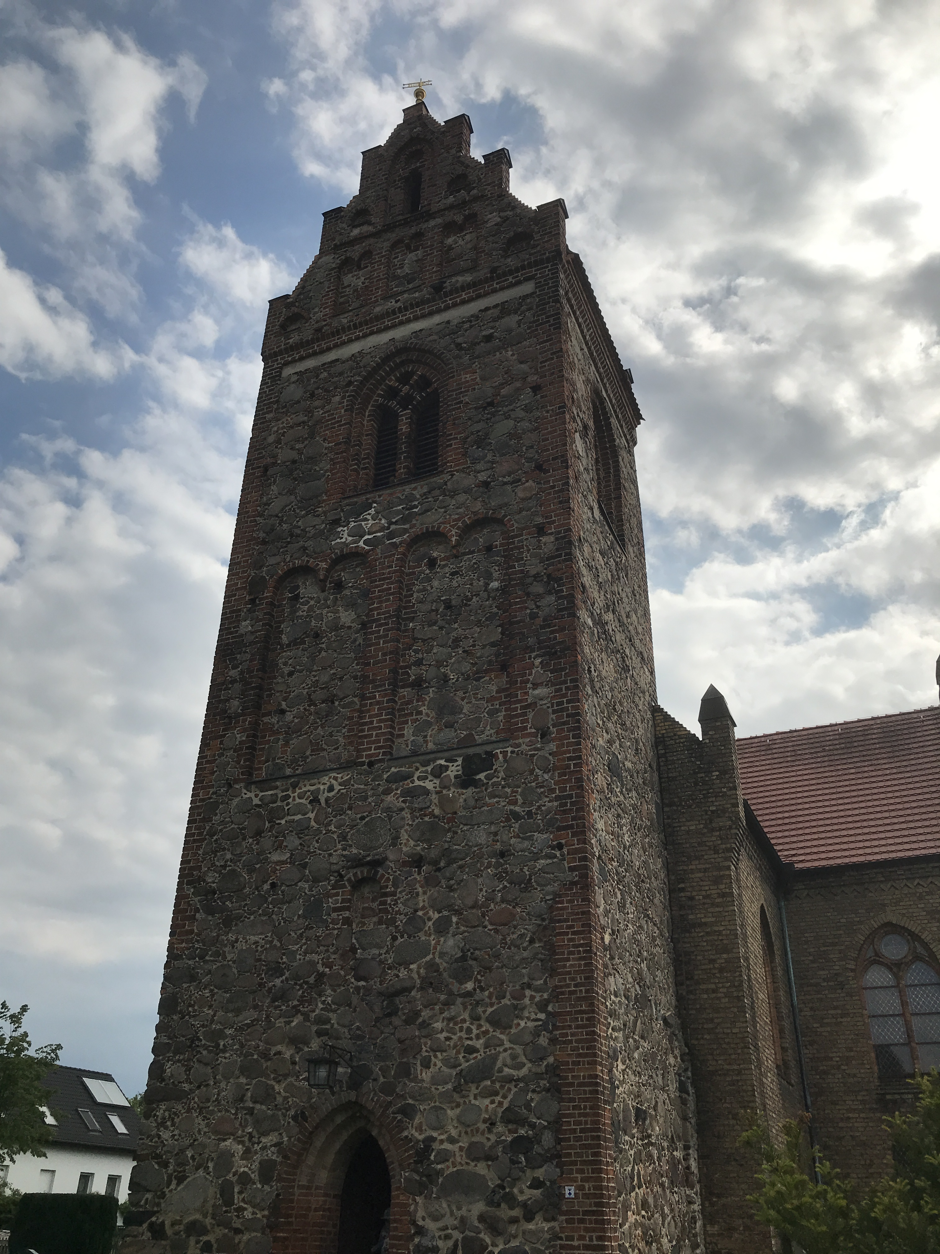 Die Dorfkirche Neu Golm ist ein neugotischer Backsteinbau in Neu Golm, einem Ortsteil der Gemeinde Bad Saarow im Landkreis Oder-Spree in Brandenburg.